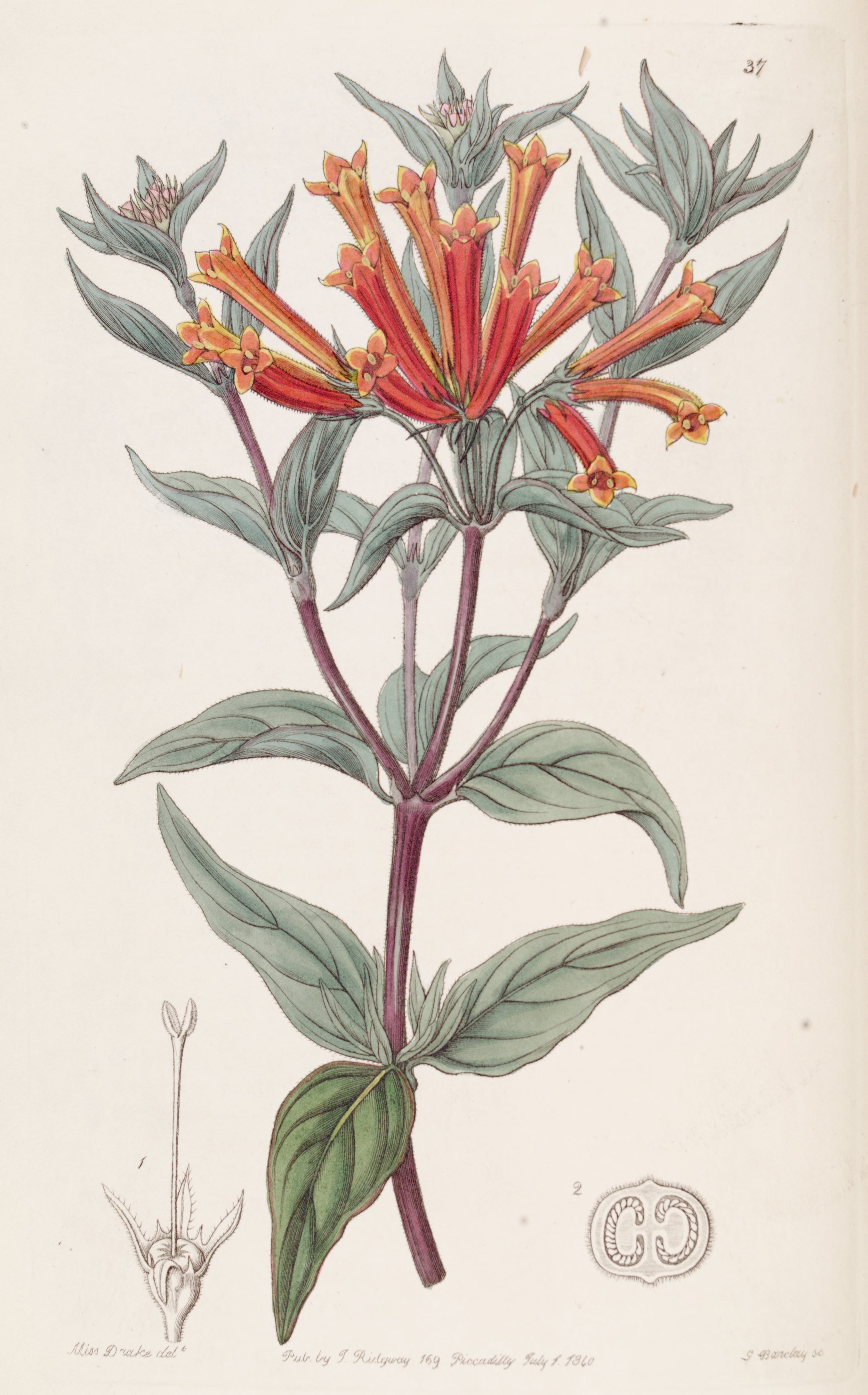 Bouvardia ternifolia